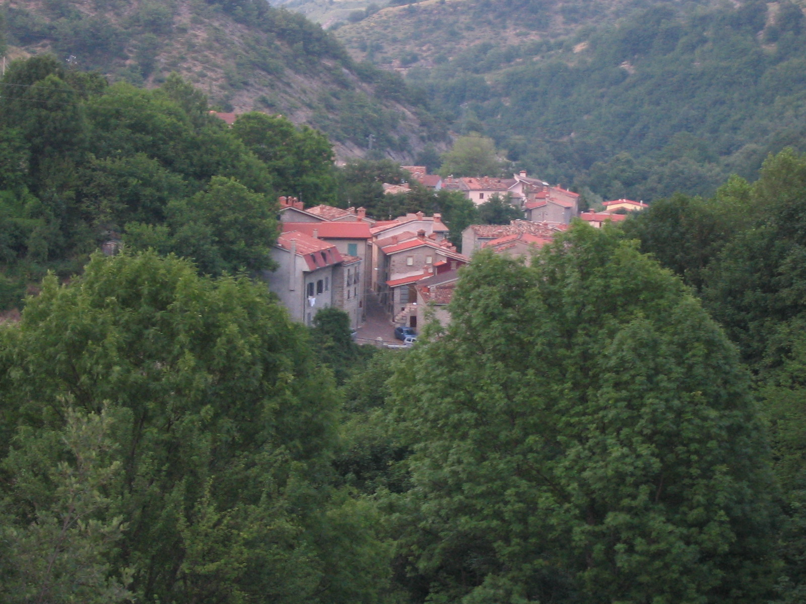 Moriero,Moriero,Padula lato fontana